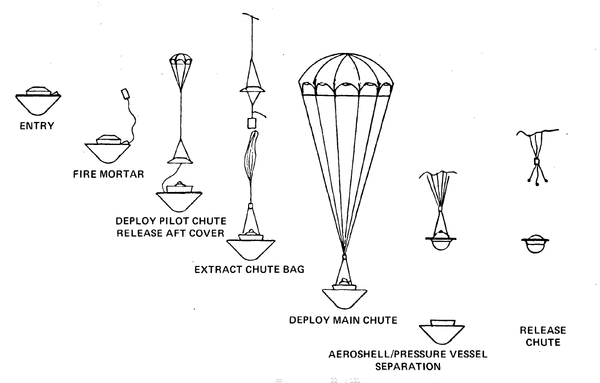 Pioneer-Venus-large-prode-descent-sequence